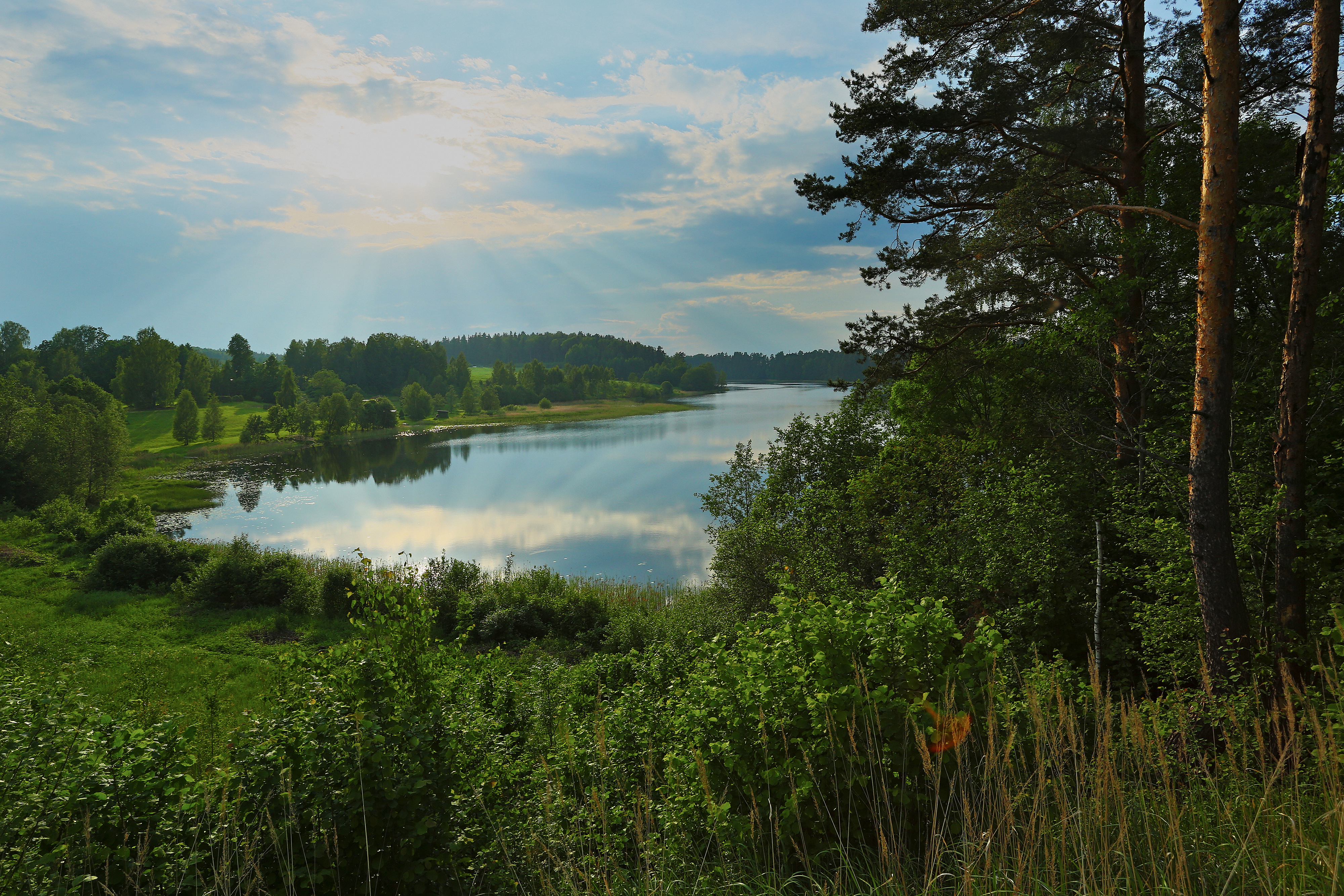 Verijärve maastikukaitseala